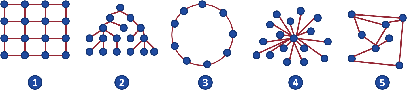 Schémas représentant les différents types de réseaux